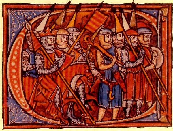 Inicial miniada con una representación del rey Jaime I de Aragón portando estandartes, guiones y gualdrapas del caballo ornadas con la Señal Real de Aragón. Miniatura del título «De expeditionibus, es assaber: De cavalgadas o corridas», cap. 28, fol. 232v. del libro VII de la compilación de fueros de Aragón elaborada por el obispo de Huesca Vidal de Canellas a mediados del siglo XIII por mandato de Jaime I de Aragón conocida como Vidal Mayor que se encuentra en el Paul Getty Museum de Malibú.